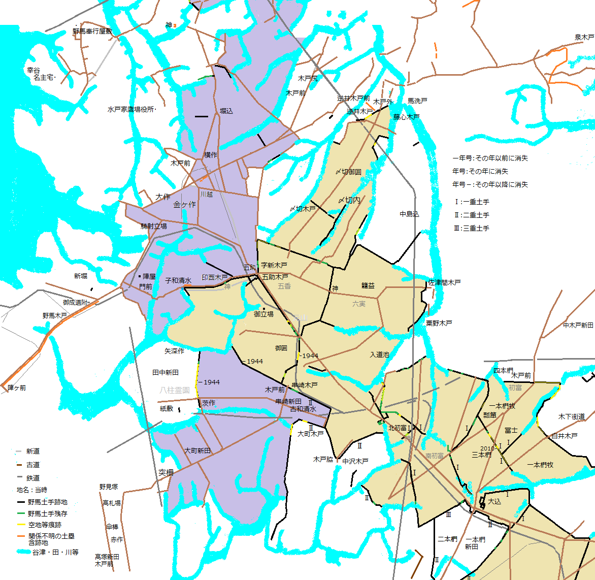 中野牧地図